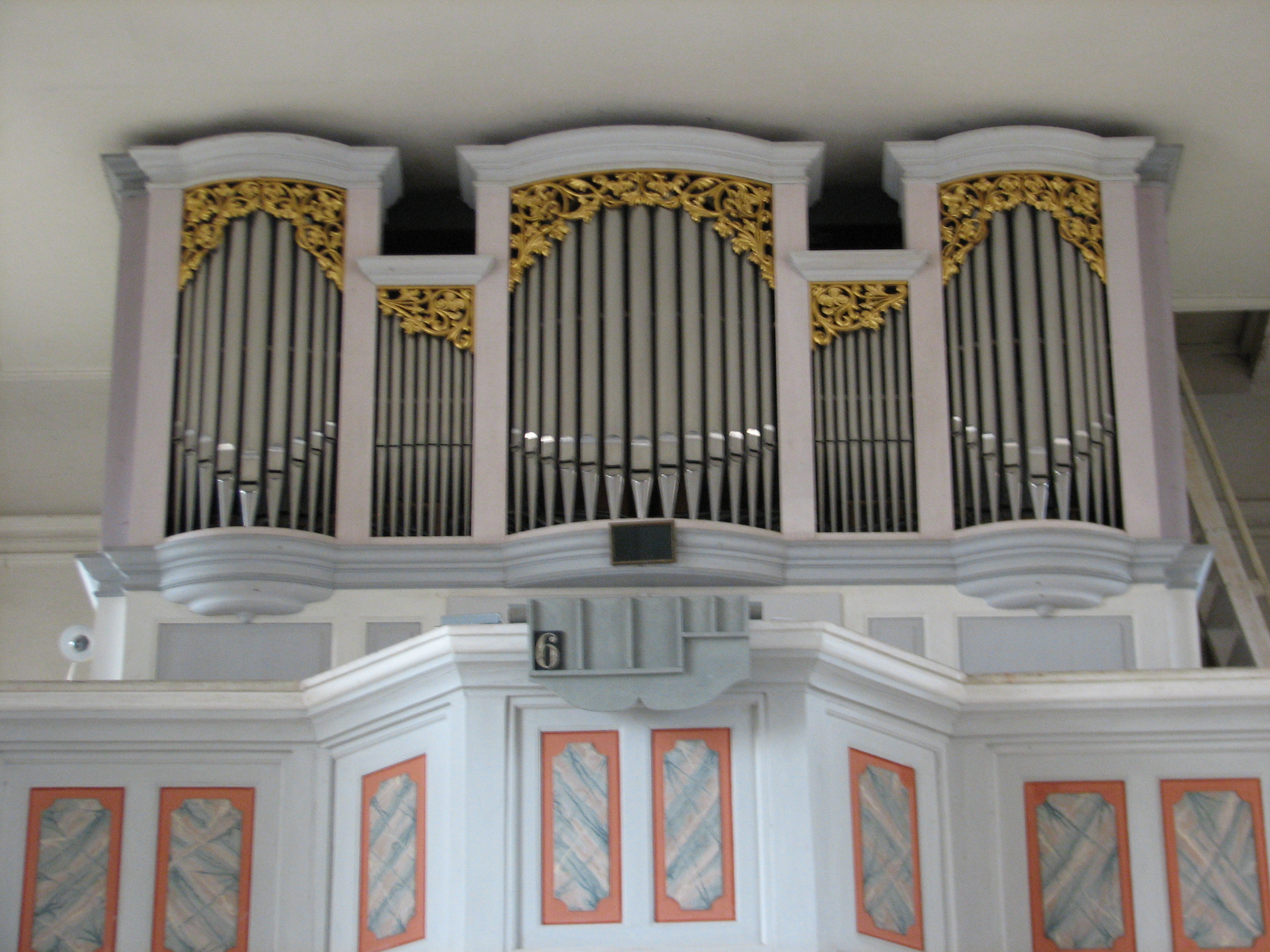 Orgelprospekt